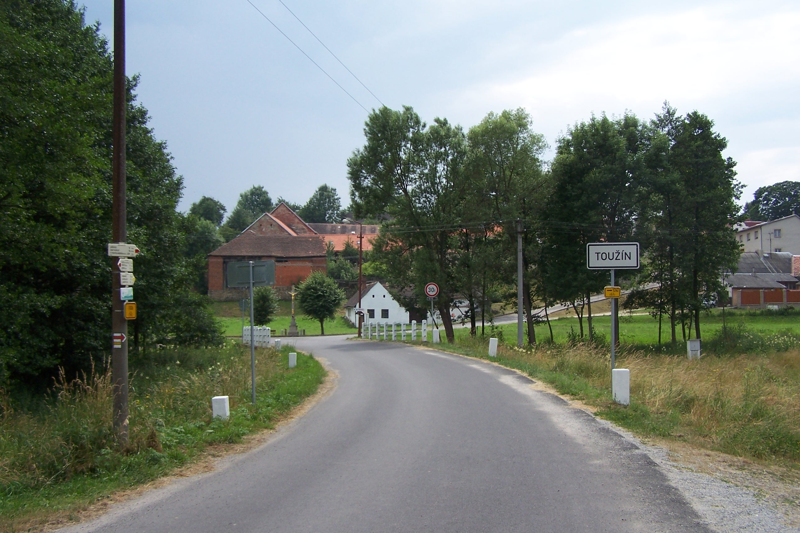 Toužín